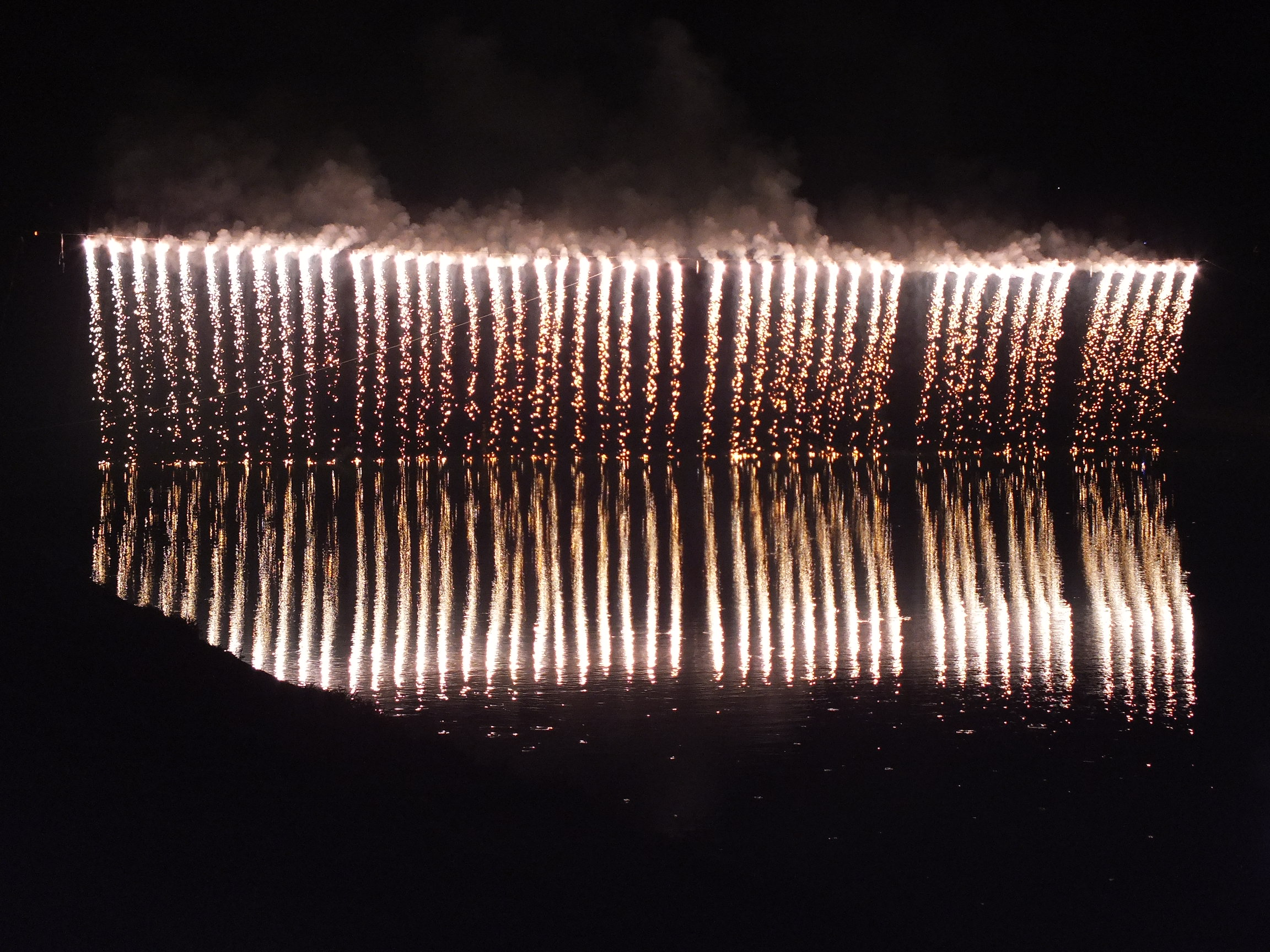 20140729 Ichijima-Kawasuso Matsuri 市島川裾祭（丹波市市島町）竹田川